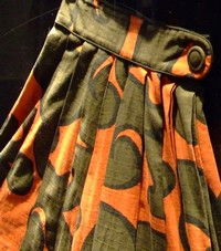 A kép a Néprajzi Múzeum "(M)ilyenek a finnek" című kiállításán készült.